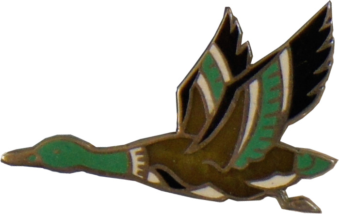 Musée de l'aéronautique Bétheny, SPA93_Canard_EC_Valois .